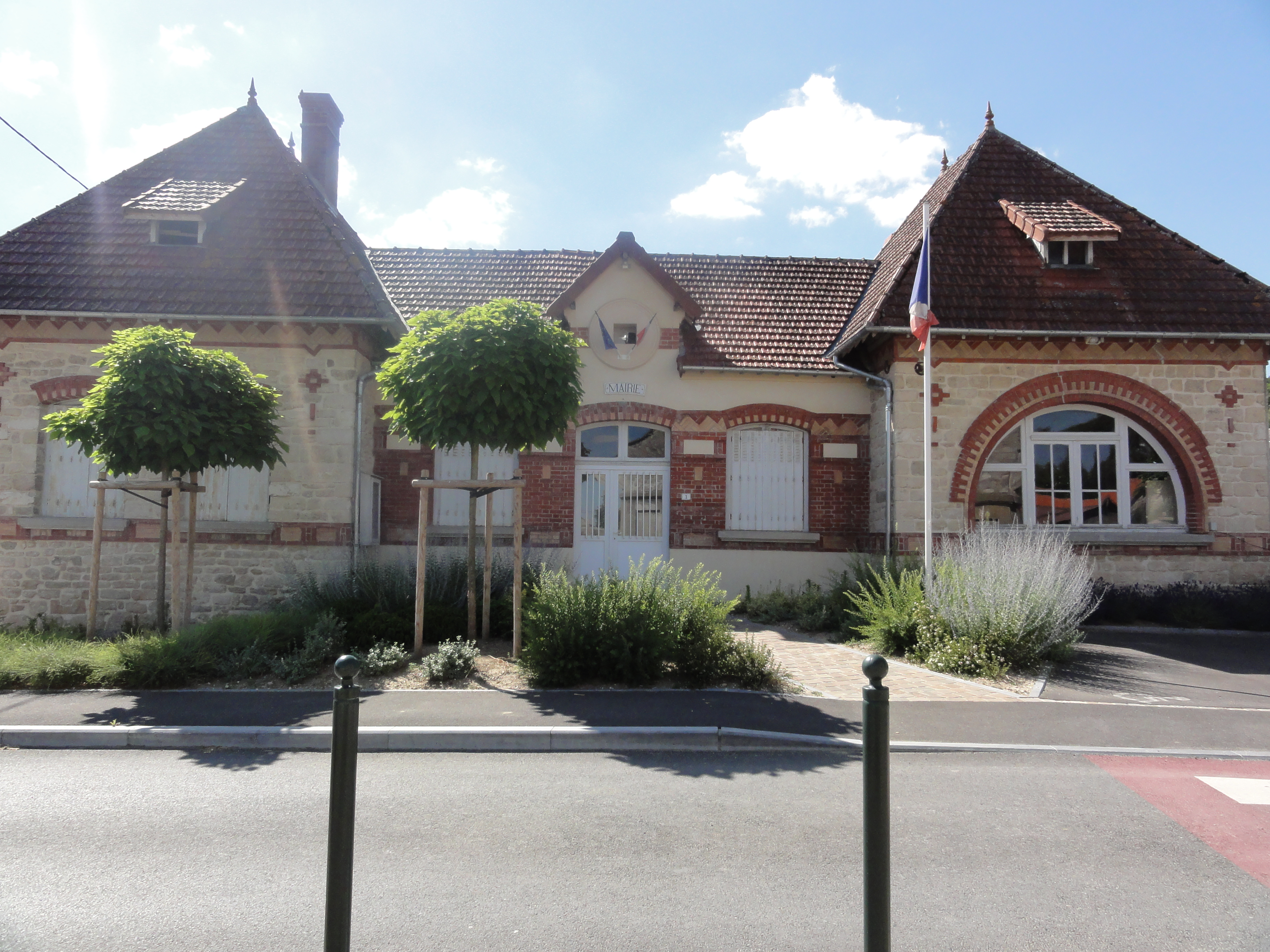 Goudelancourt-lès-Berrieux (Aisne) mairie